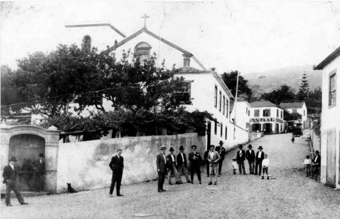 Igreja de Nossa Senhora da Graça. Largo do Patim e Rua da Igreja, no ano de 1925, vendo-se a casa paroquial e a igreja ainda sem o relógio. Matriz do Estreito de Câmara de Lobos Reconstrução de António Vila Vicêncio, 1790 (c.). Fotografia do arquivo da revista Girão. Estreito de Câmara de Lobos, ilha da Madeira. Pub. in revista Girão, Vol. II, n.º 6, 2.º semestre de 2011, Câmara de Lobos, p. 5.